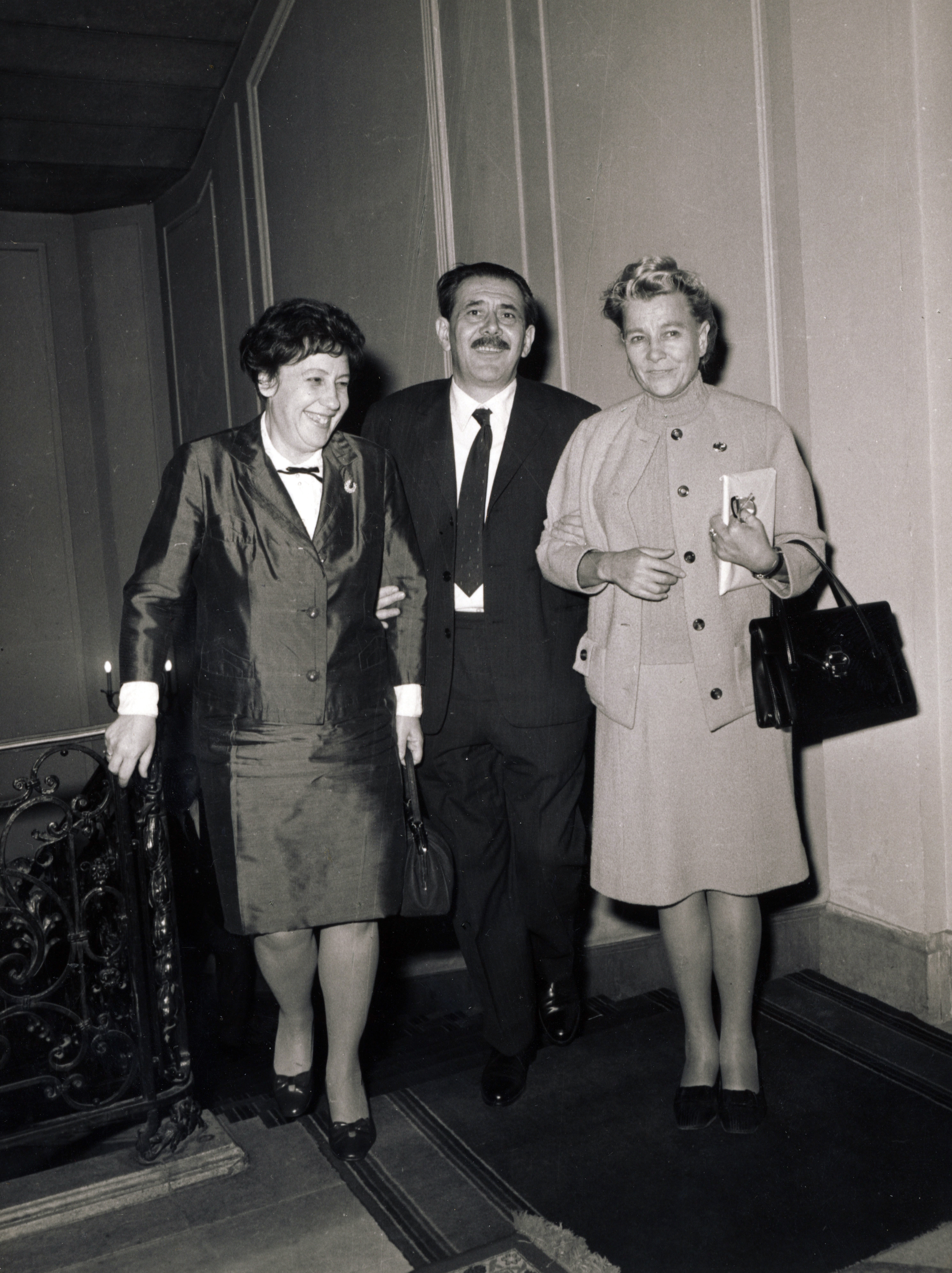 középen Aczél György kultúrpolitikus, jobbra Jekatyerina Alekszejevna Furceva, a Szovjetunió kulturális minisztere.Probably visit in Hungary Location: Hungary Title: középen Aczél György kultúrpolitikus, jobbra Jekatyerina Alekszejevna Furceva, a Szovjetunió kulturális minisztere.